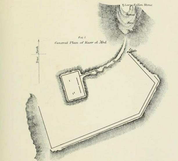 תמונות ושרטוטים מהאתר עראק אל אמיר שצילם או שרטט קלוד קונדר בסקר ארץ ישראל המזרחית בשנת 1881. שרטוט תכנית גללית של קצר אל עבד